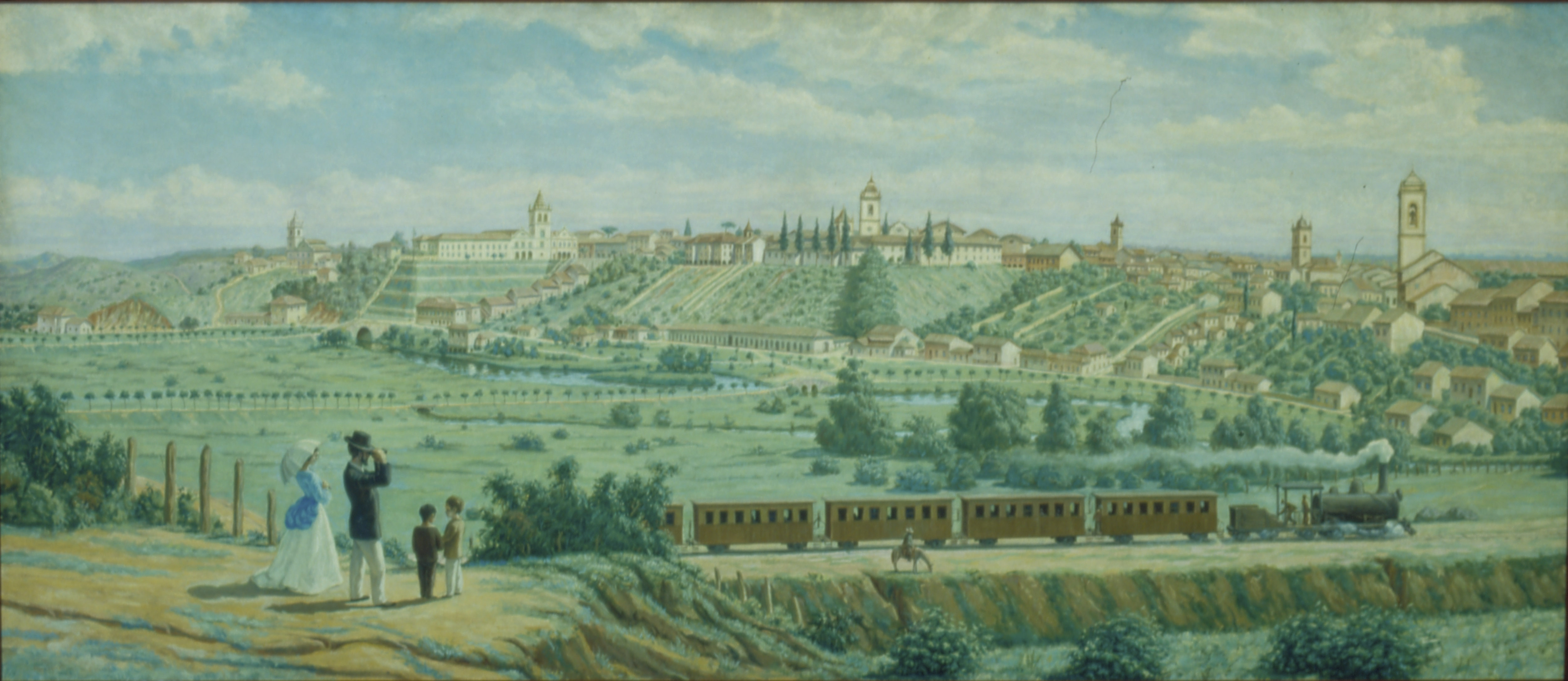 Obra que integra o acervo do Museu Paulista da USP. Coleção Fundo Museu Paulista - FMP